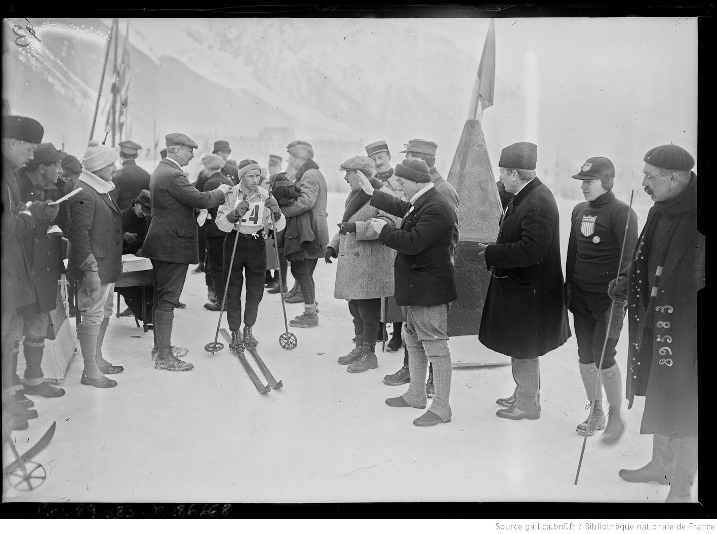 Chamonix, 30/1/24, concours de skis [sic], Hevak (Stephan) [skieur tchécoslovaque aux jeux olympiques d'hiver] : [photographie de presse] / [Agence Rol]